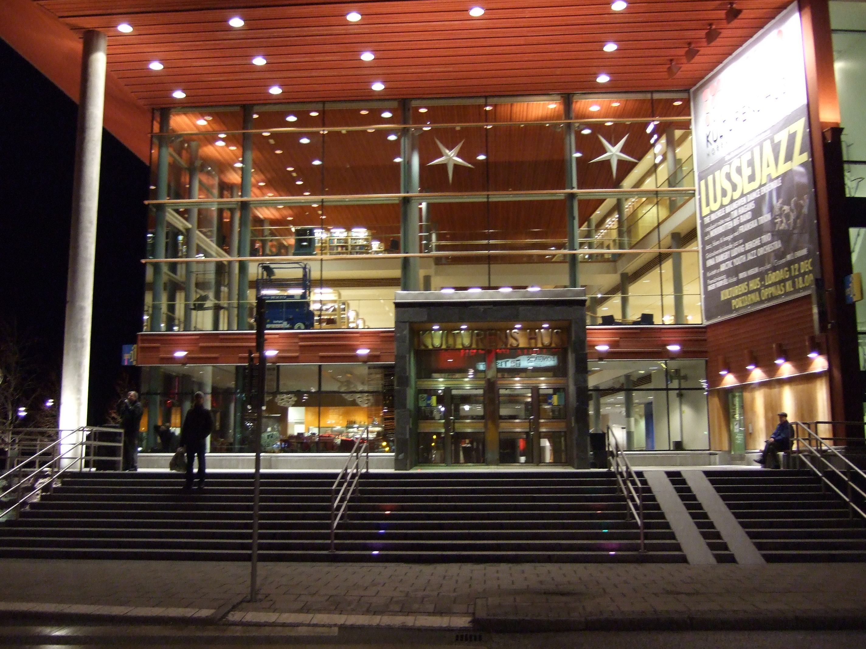 Luleå